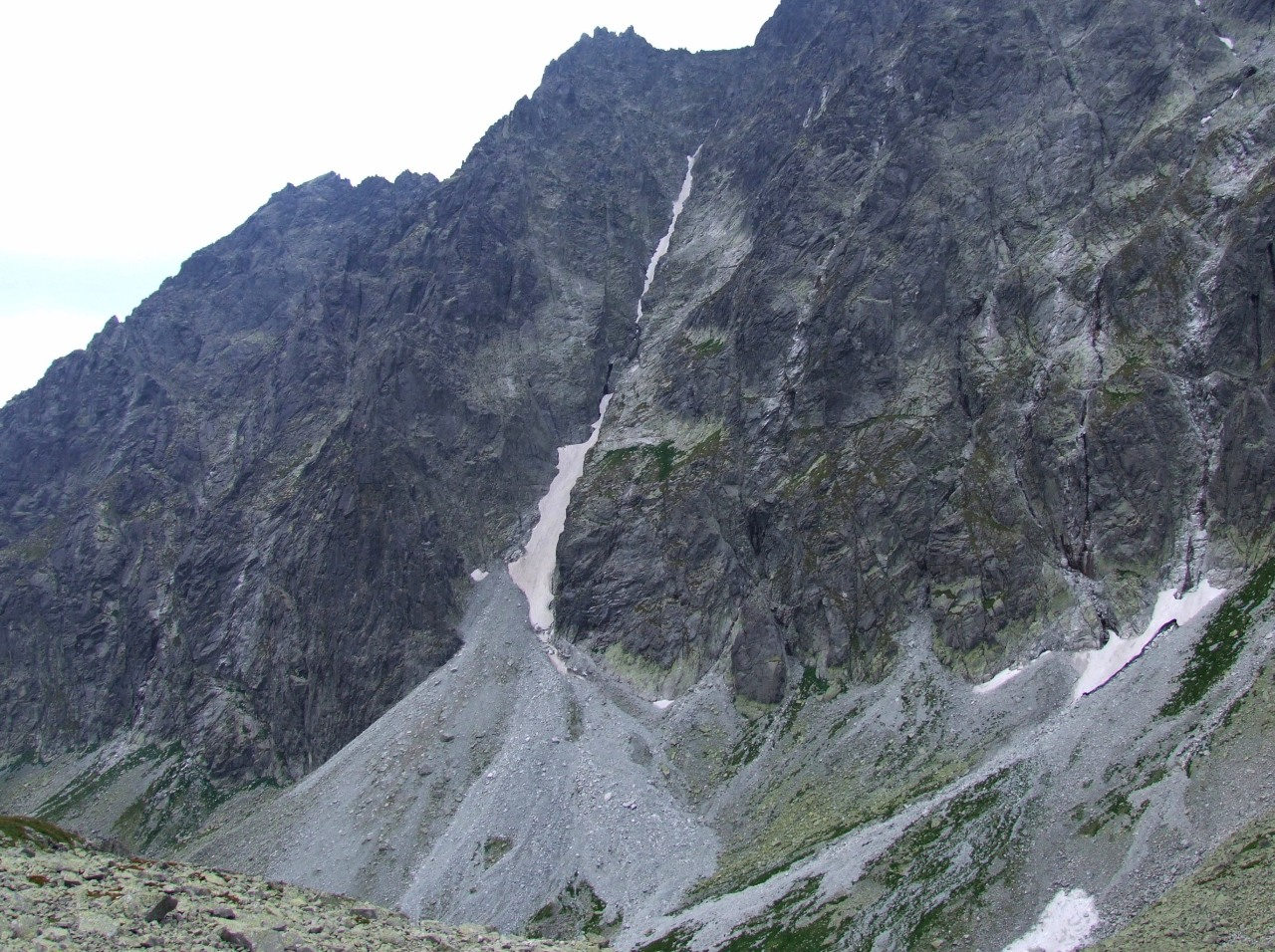 Żleb Karczmarza, widok z Doliny Wielickiej